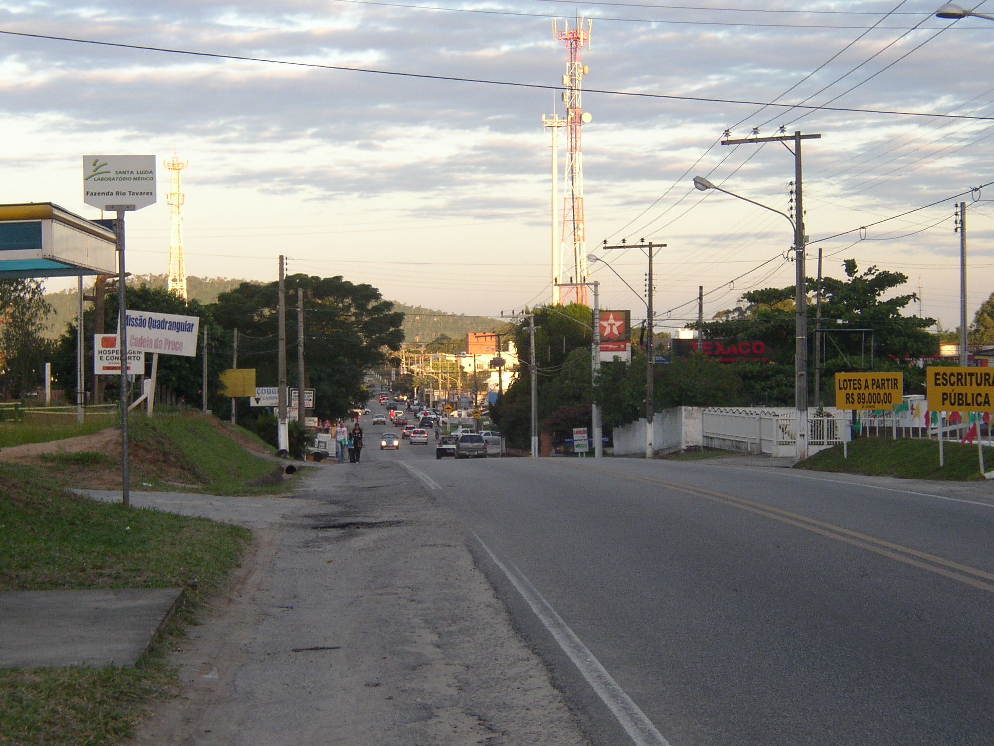 Avenida Pequeno Príncipe in Campeche (Florianópolis)